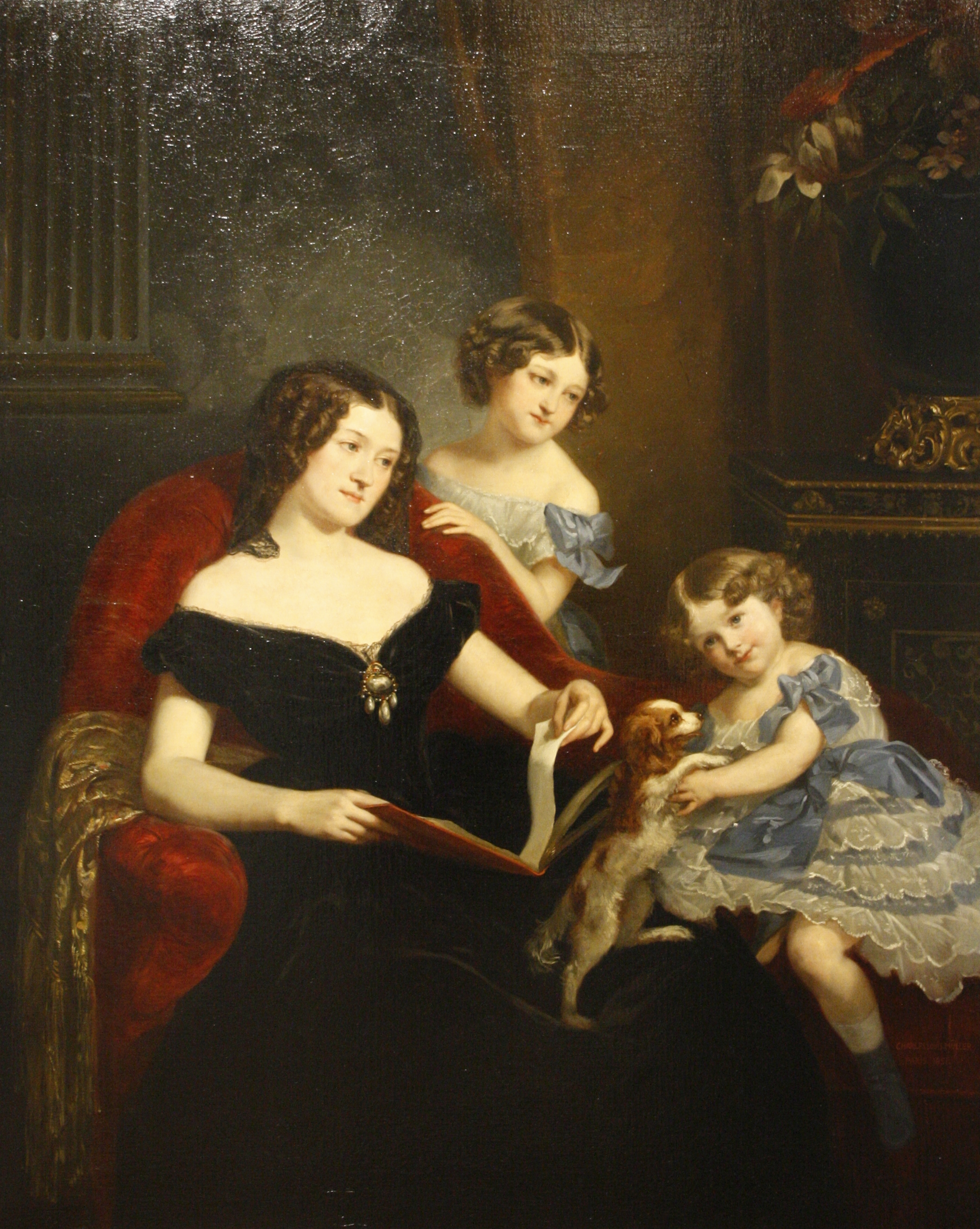 Графиня Евдокия Николаевна Апраксина, ур. Небольсьнна (1821—1886) с дочерьми Марией (1843—1923; в замужестве Чернышева-Кругликова) и Евдокией (1847—1876; в замужестве Стенбок-Фермер).